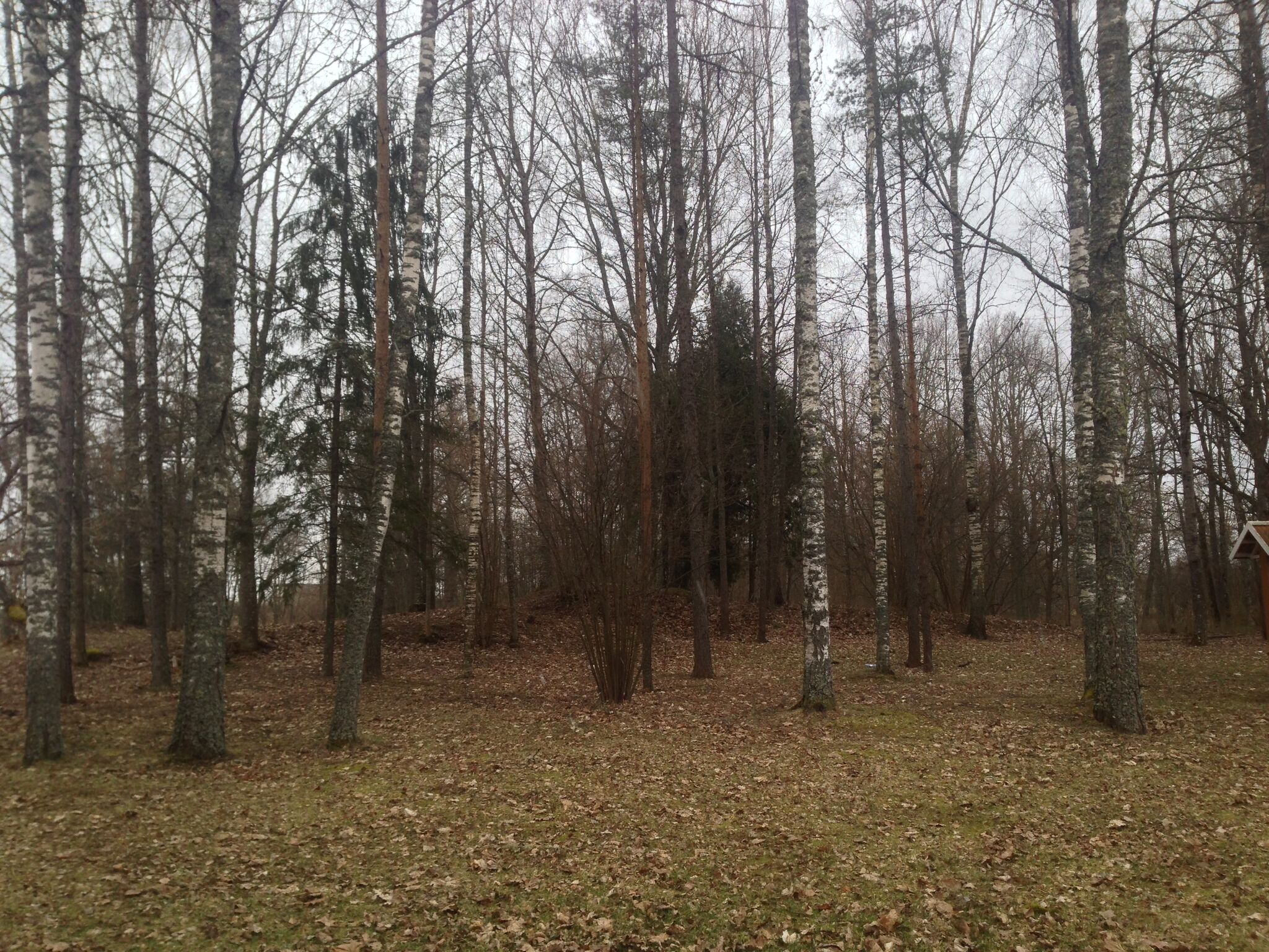 Mõniste mõisa hävinud peahoone asukoht